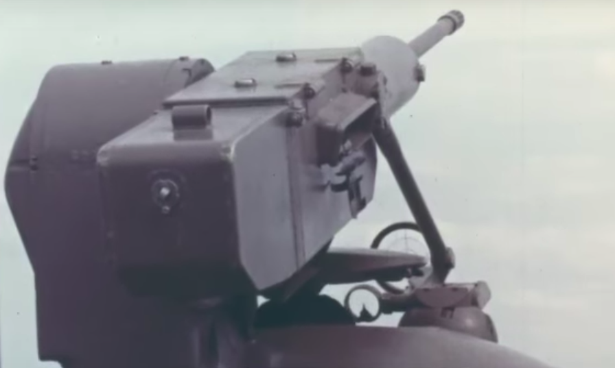 En 20 mm akan m/45B Bofors monterad på en observationshuv på en Pbv 301.